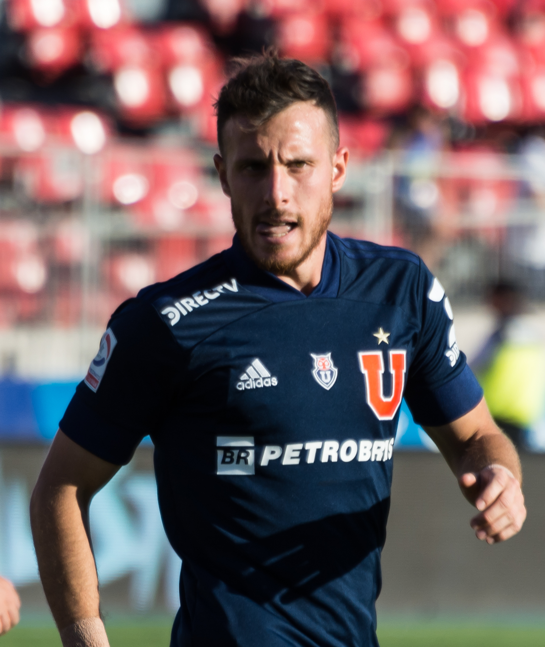 Universidad de Chile v Unión La Calera, Estadio Nacional, Ñuñoa, Santiago, Región Metropolitana, Chile